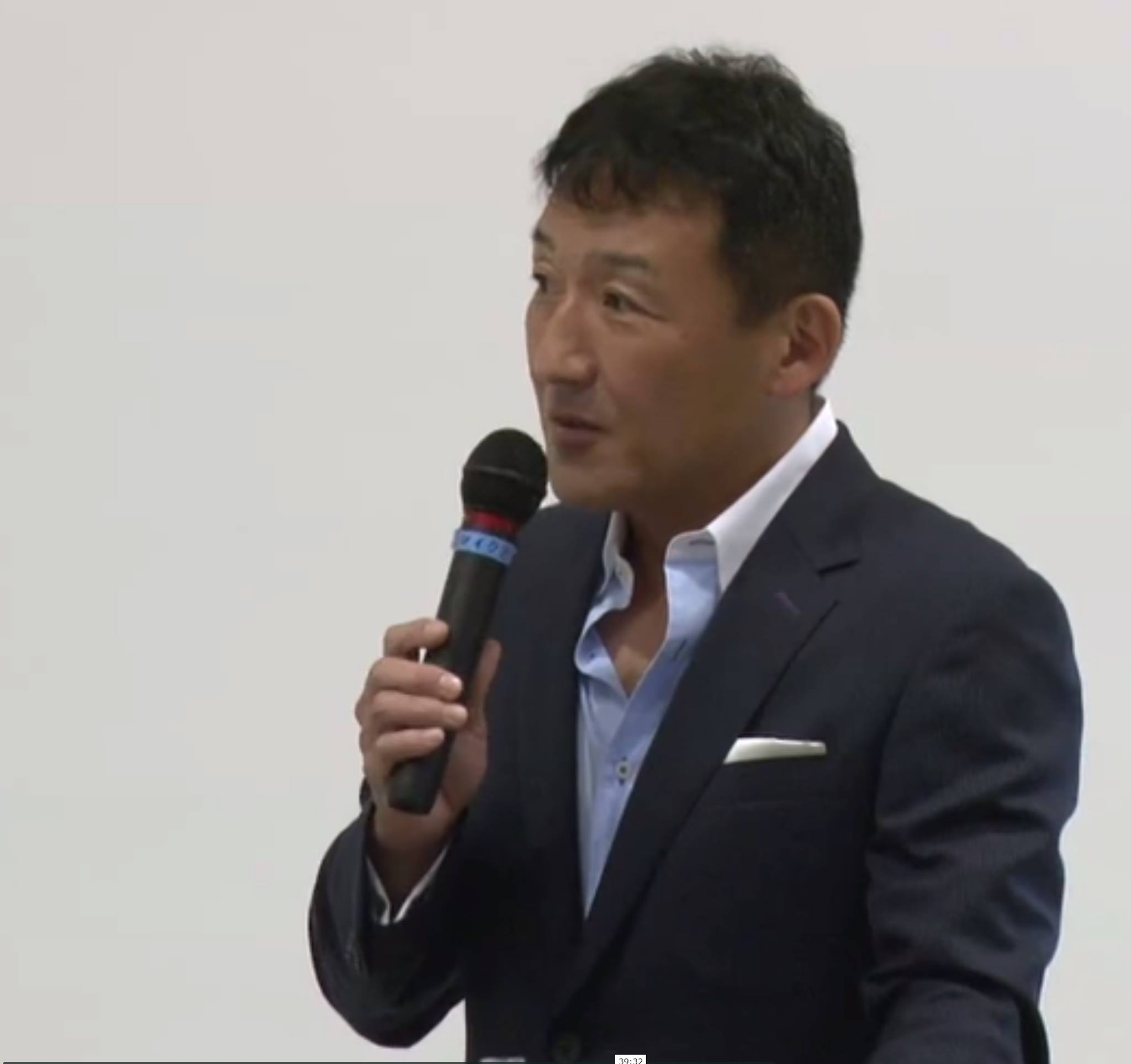 ２０１７年６月株式会社ジャクエツにて作品のプレゼンテーションをする澄川伸一